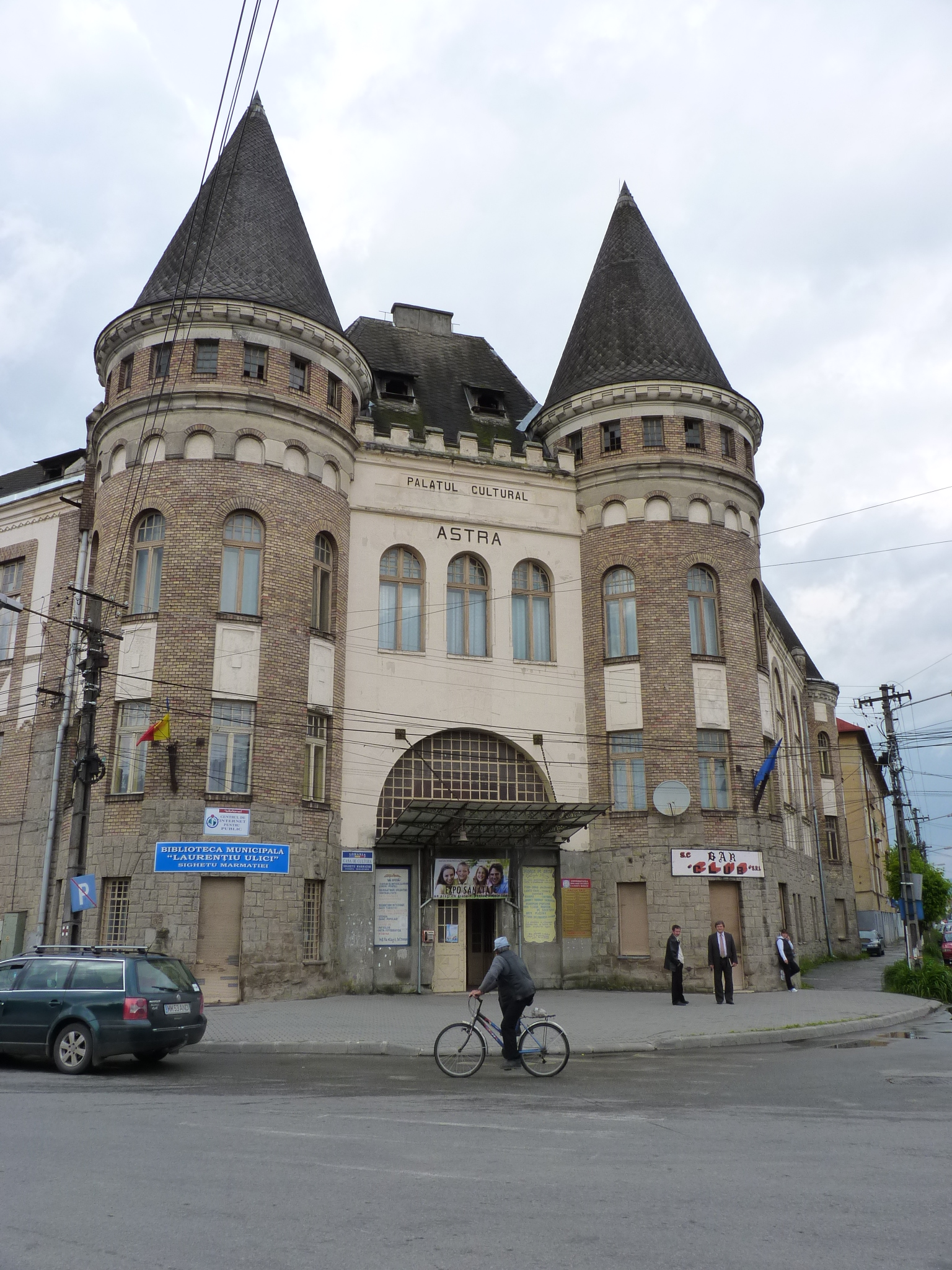 Vedere cu fatada Palatului Cultural din Sighetu Marmatiei, Judetul Maramures. Primavara 2010